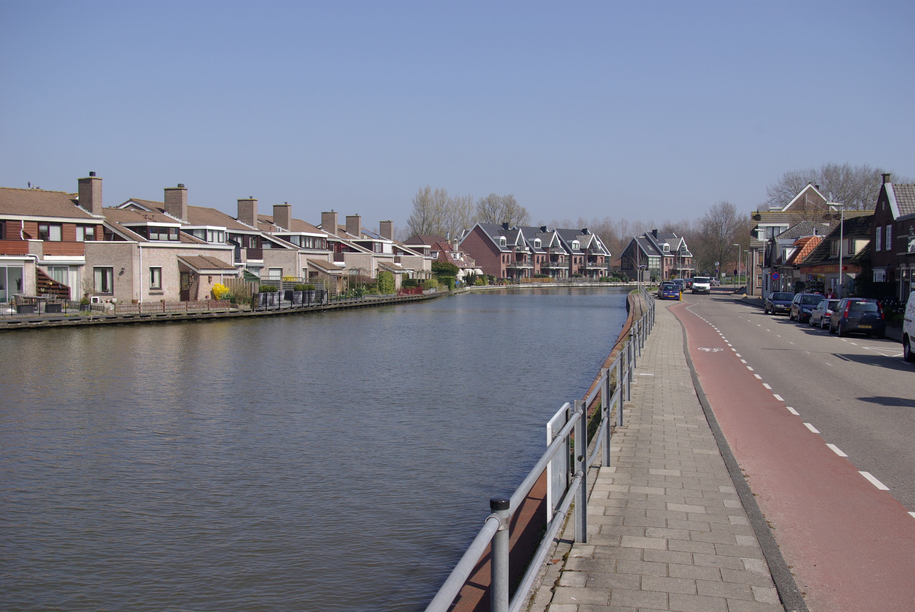 Der Fluss Smal Weesp in Driemond